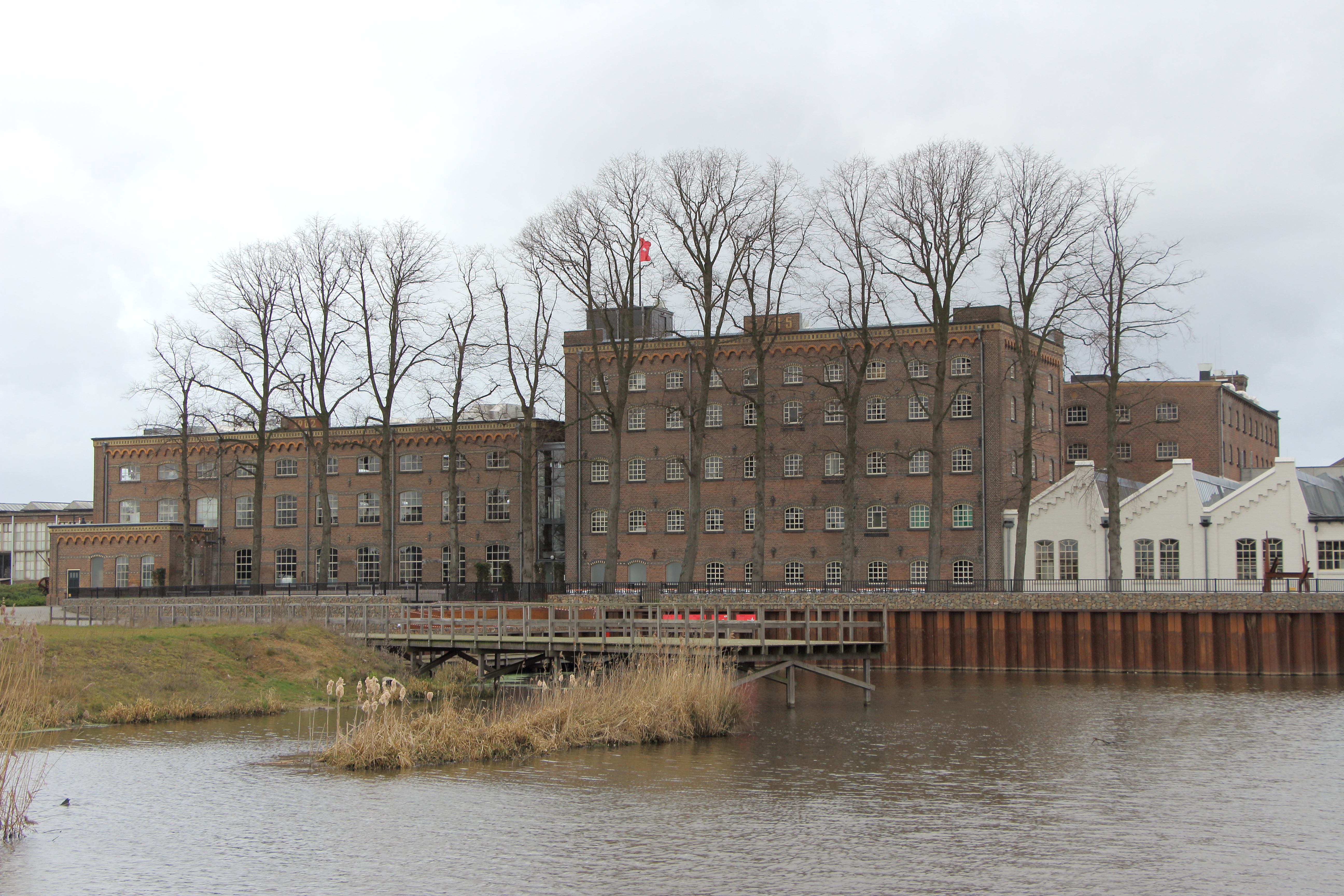 DRU-complex, Ulft.